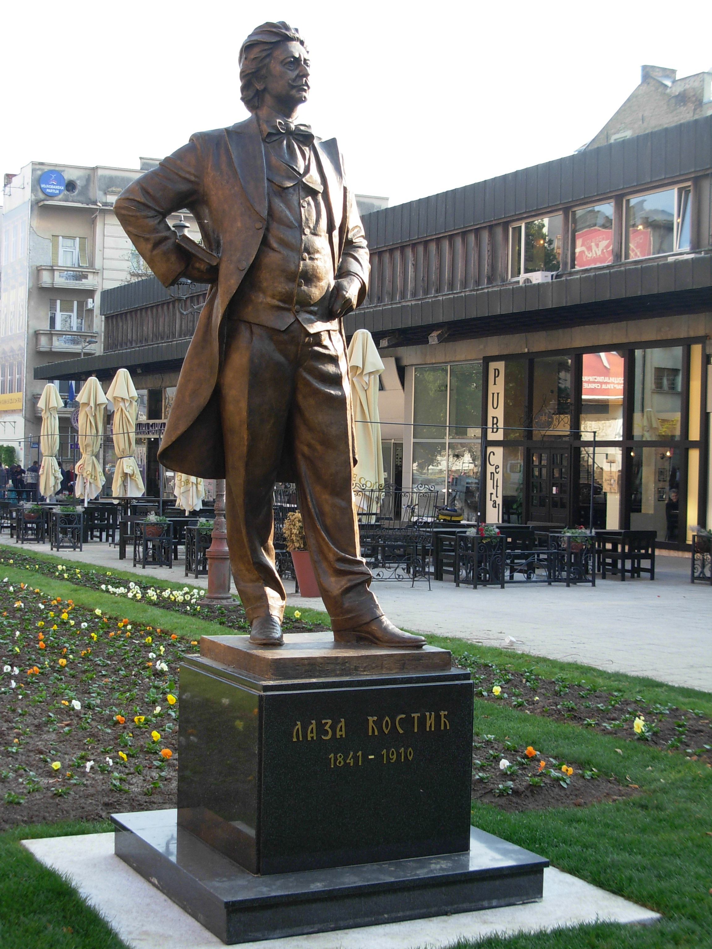 Spomenik Lazi Kostiću u centru Novog Sada.